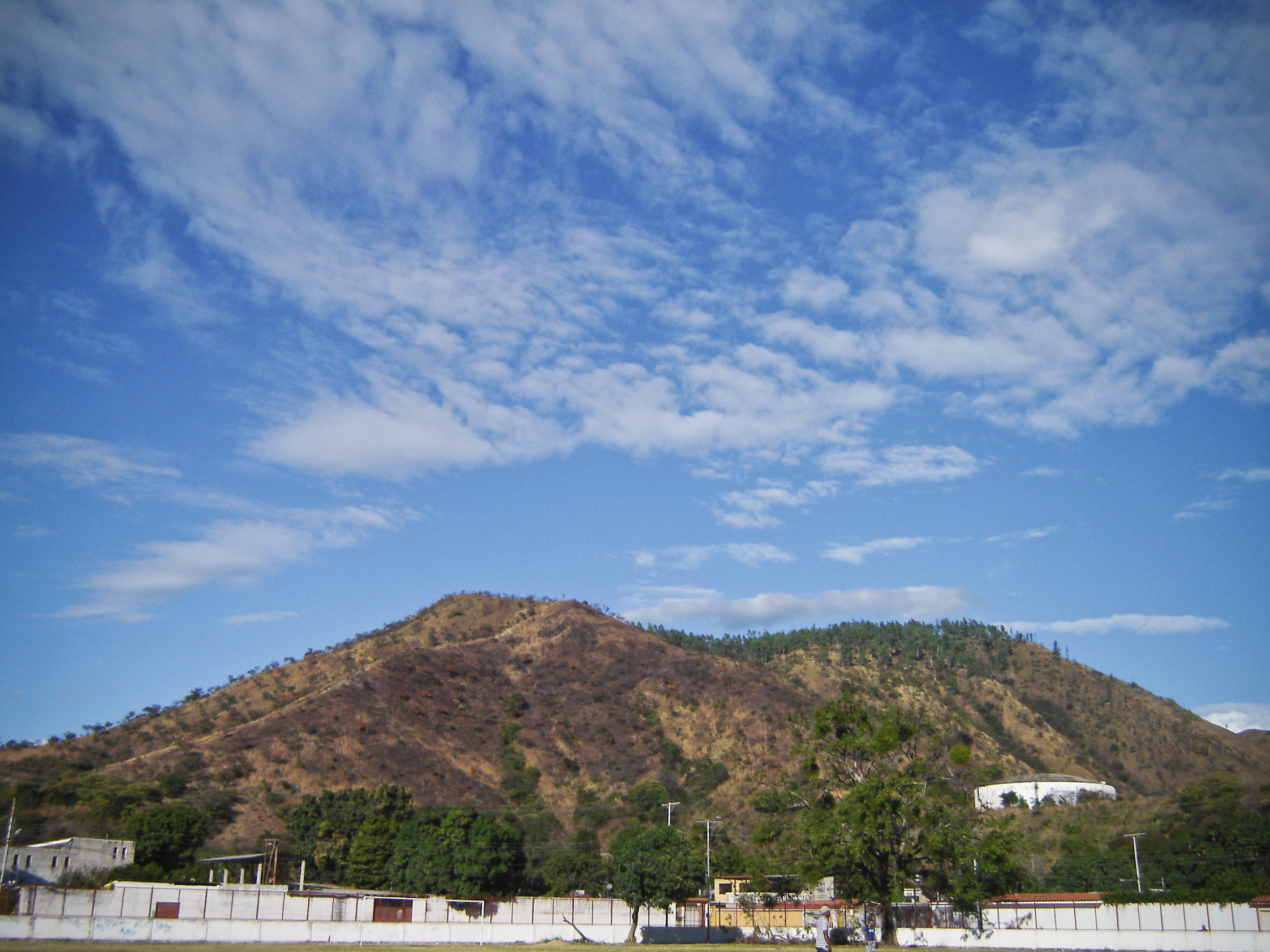 Fotografía realizada por mi persona al "pulmón" de Cagua, mejor conocido como el cerro El Empalao.